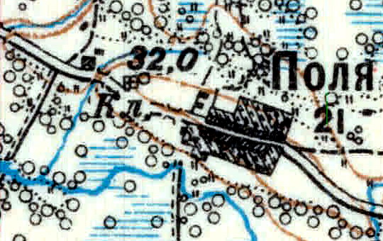 Топографическая карта Ленинградской области, квадрат VIc (Красные Горы), деревня Поля